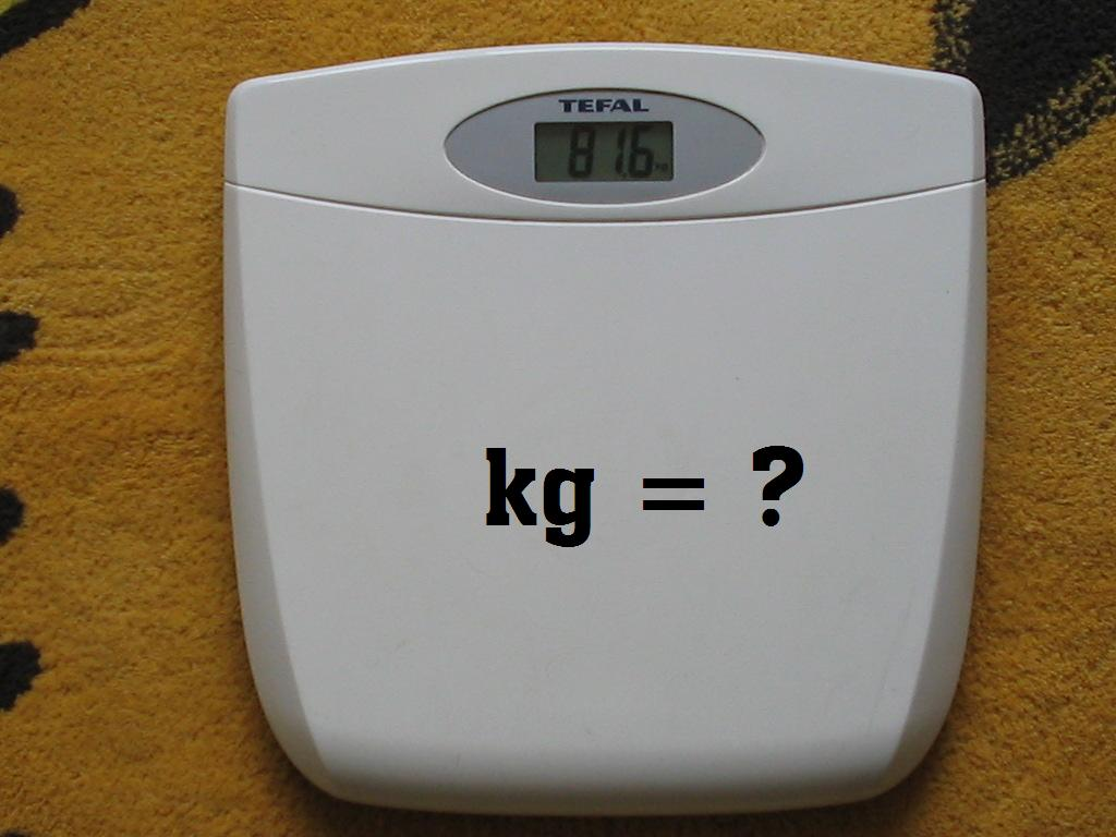 am anh can nang